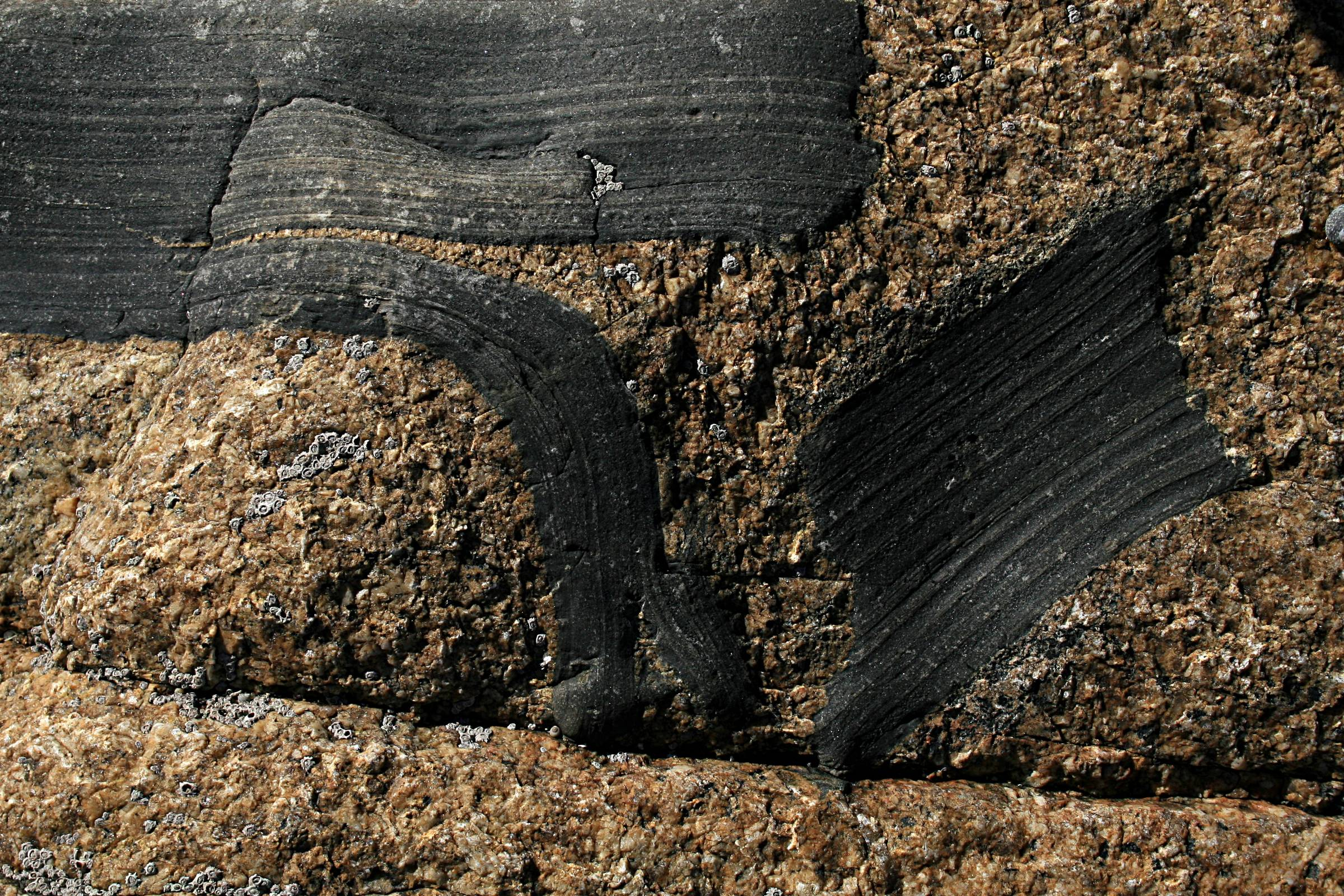 Enclave anguleuse dans un granite, Trébeurden